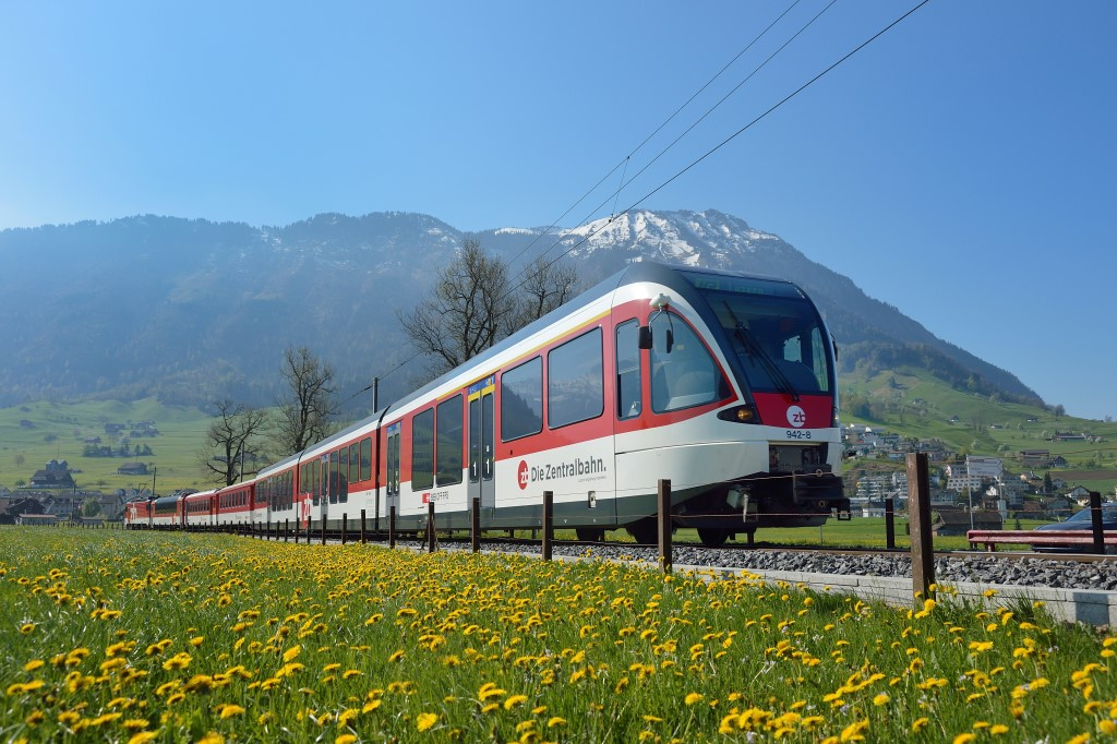 Luzern-Engelberg Express